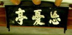 망우정의 현판